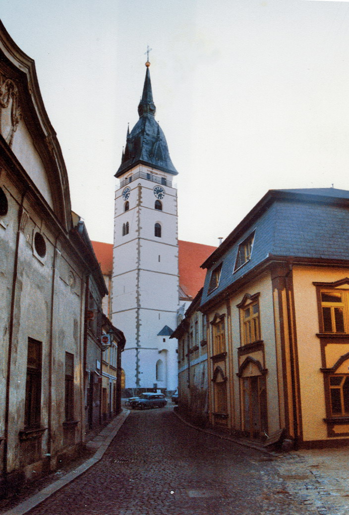 Jindřichův Hradec, městská vyhlídková věž u farního kostela Nanebevzetí Panny Marie, objekt ve správě Muzea Jindřichohradecka. Pohled z Kostelní ulice.